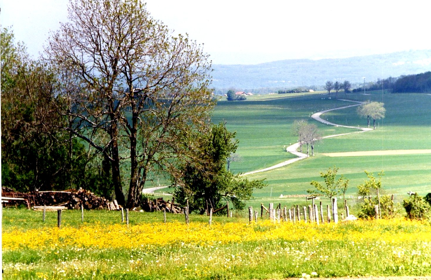 La richesse d'un terroir céréalier à près de 700 mètres d'altitude